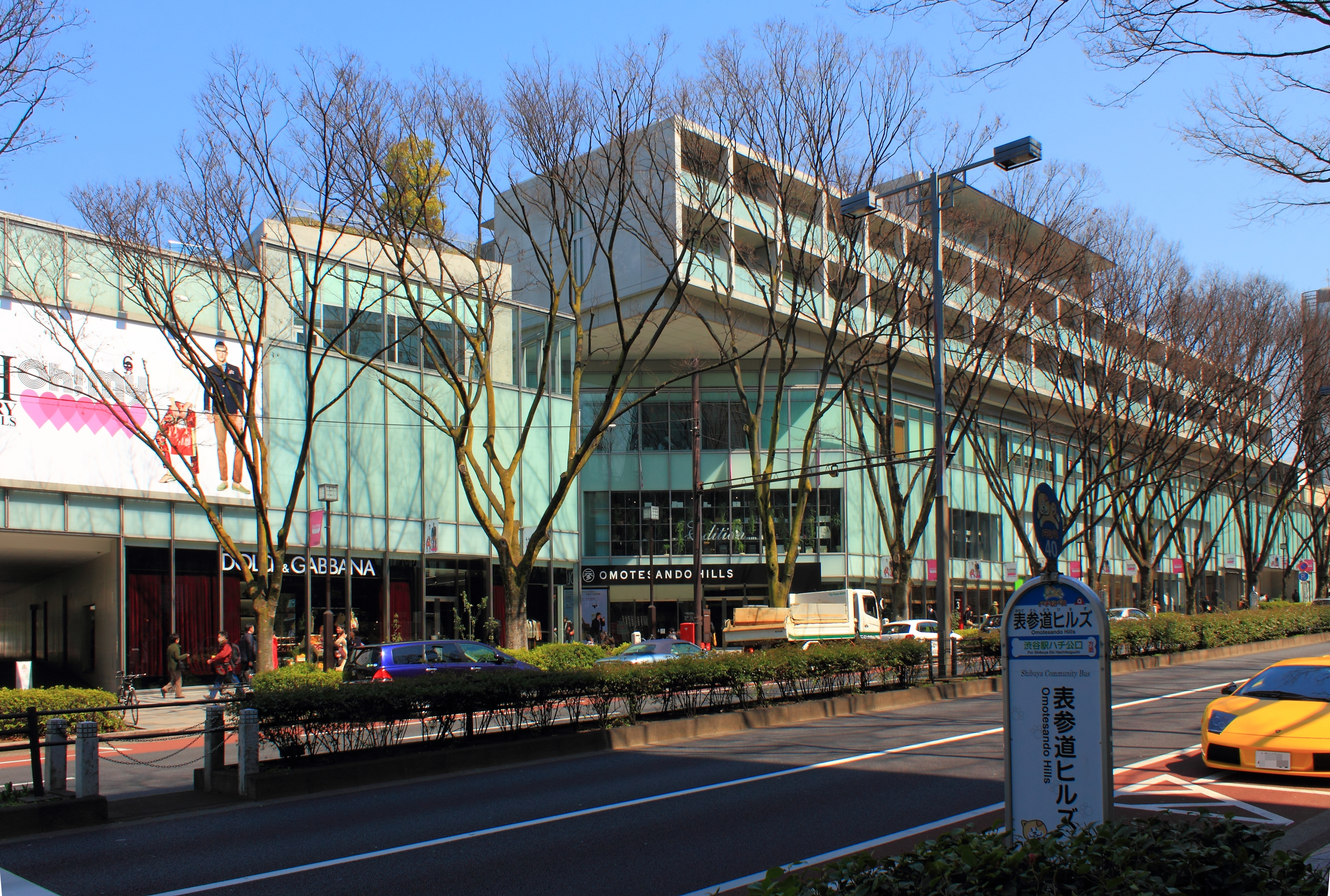 表参道ヒルズ（東京都渋谷区）